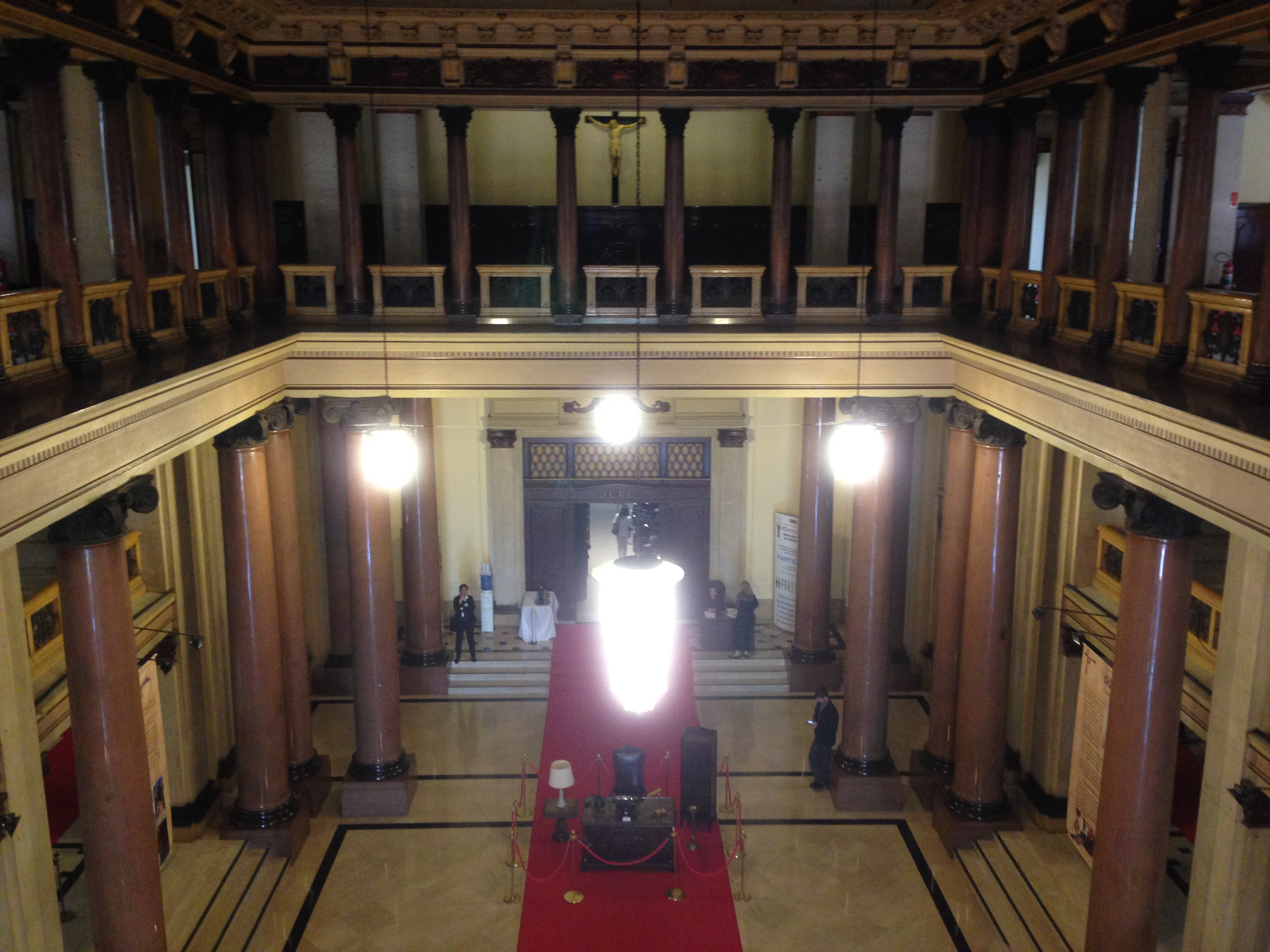 Sala situada no andar inferior do interior do Palácio da Justiça, em São Paulo (SP), Brasil